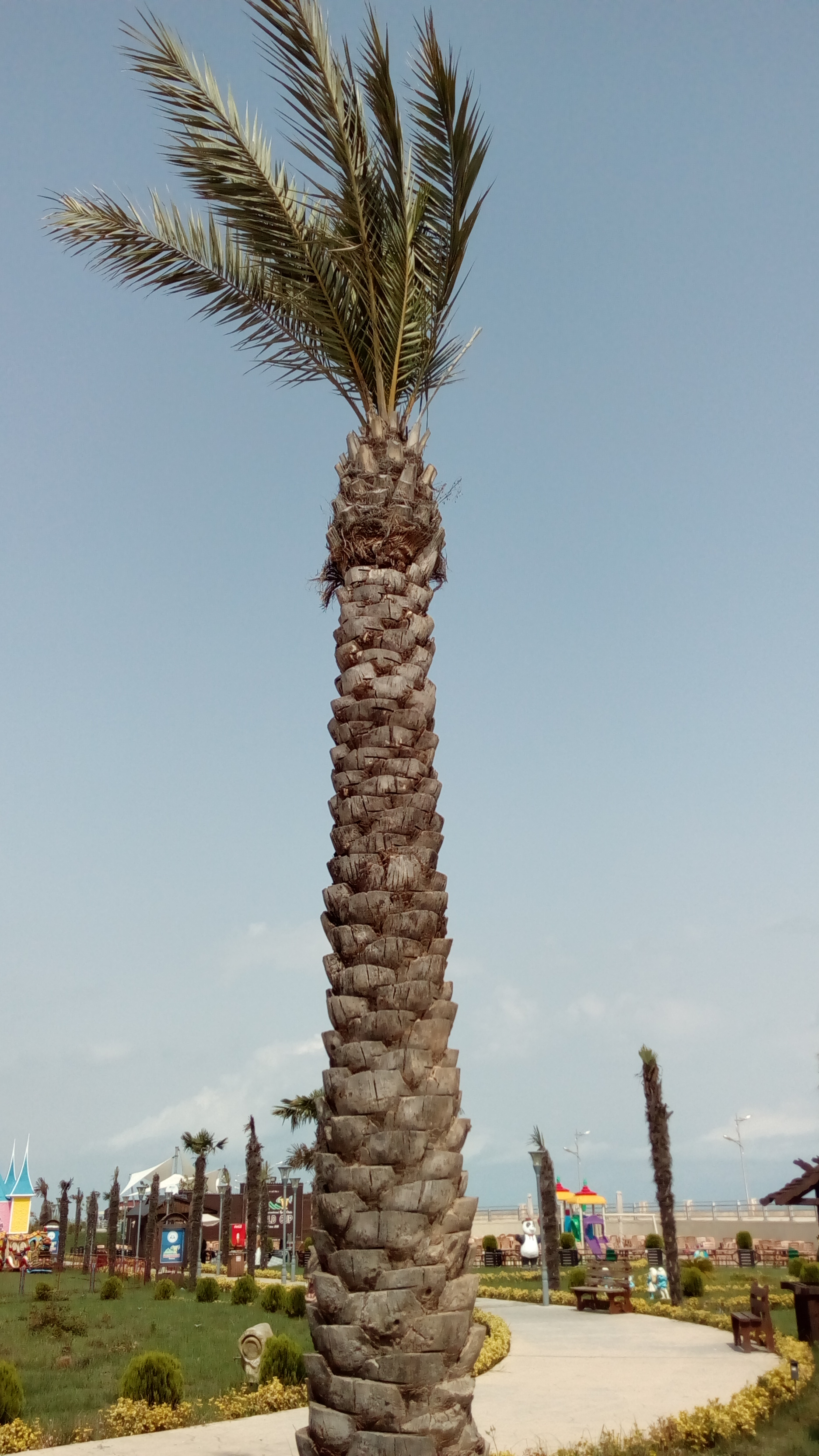 Astara bulvarı